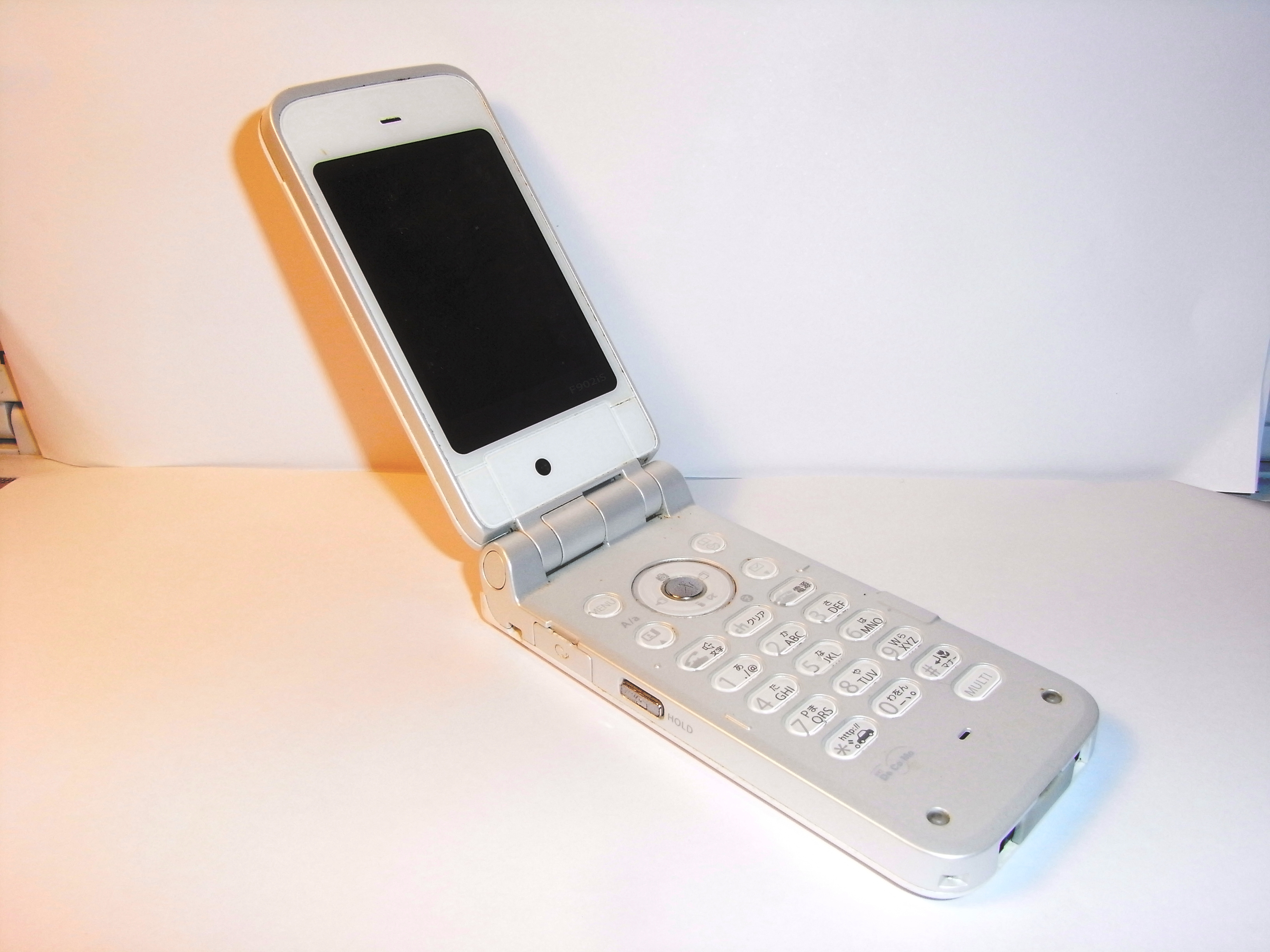 NTT docomo F902iS(F902iS